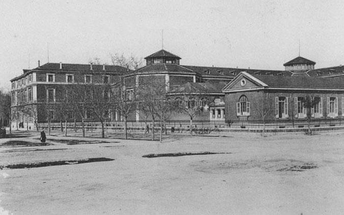 Antigua Facultad de Medicina y Hospital Provincial de Valladolid